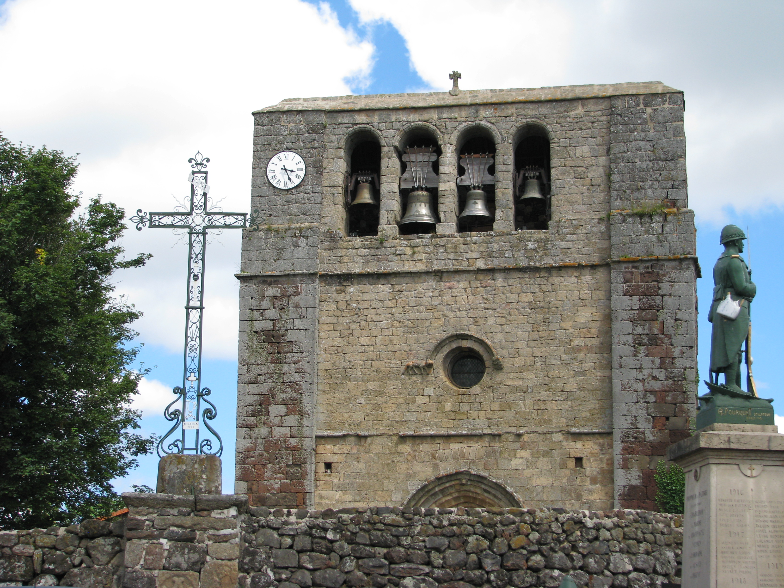 Eglise saint paul du XIIe siecle